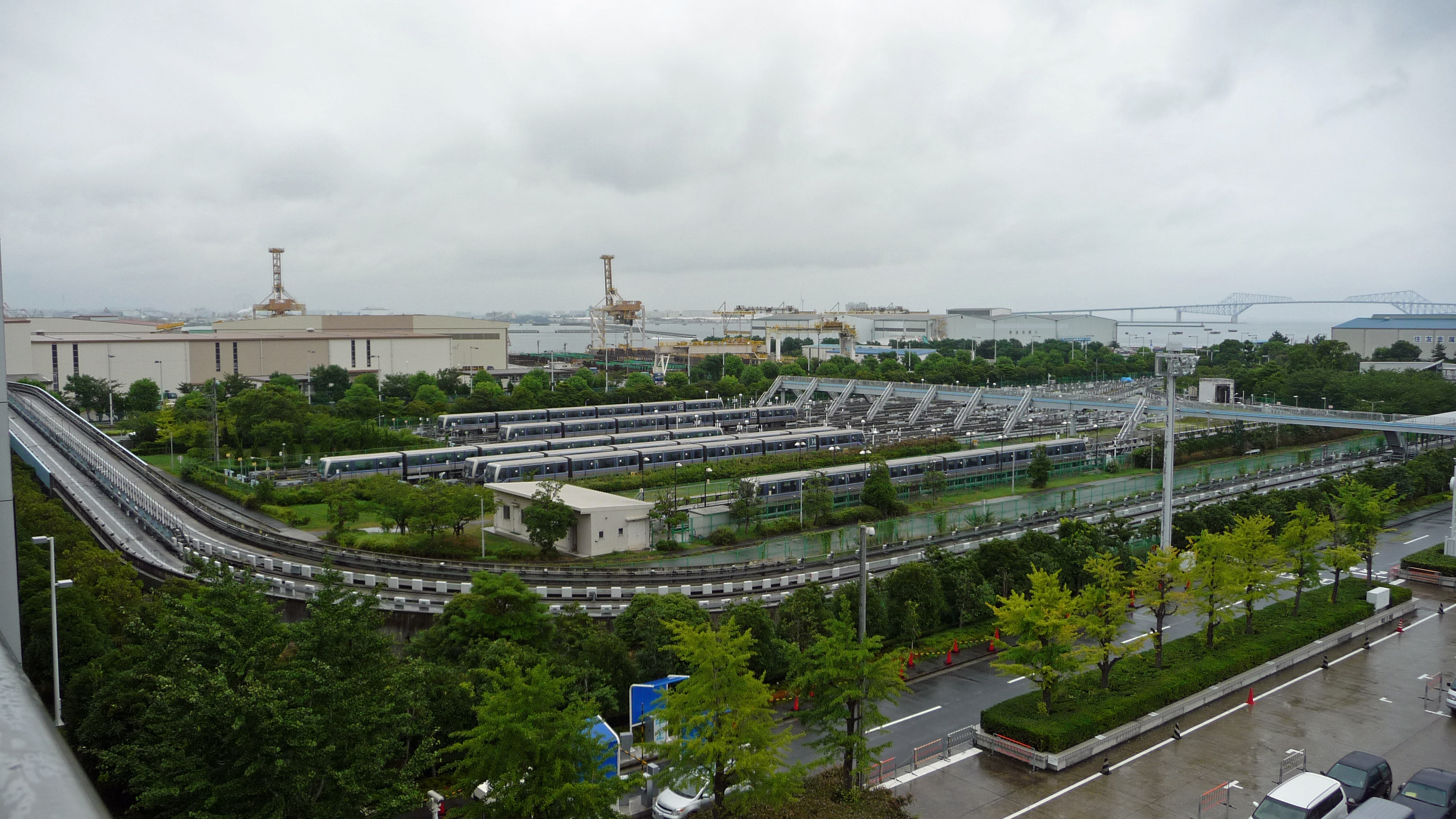 東京ビッグサイトから望む ゆりかもめ車両基地